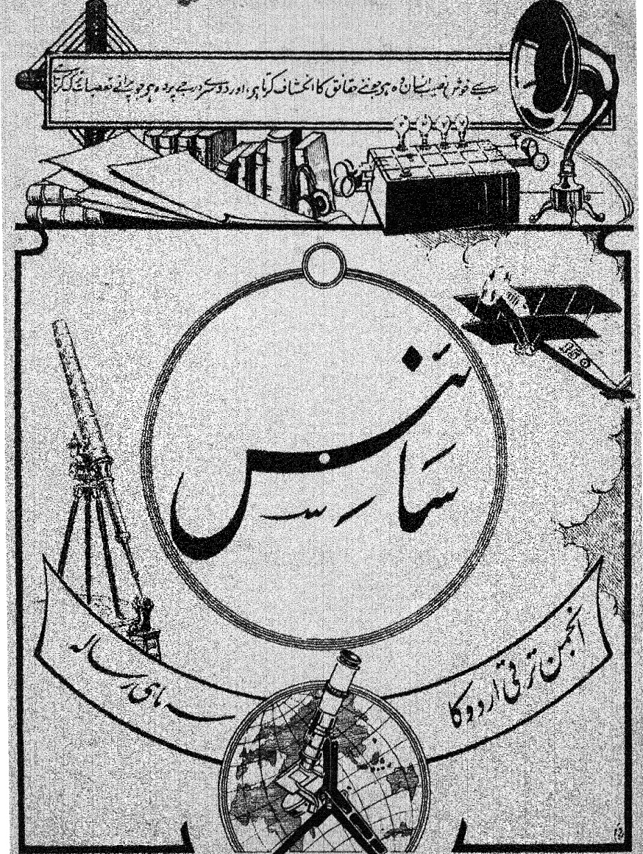 سائنس سہ ماہی انجمن ترقی اردو جنوری 1934